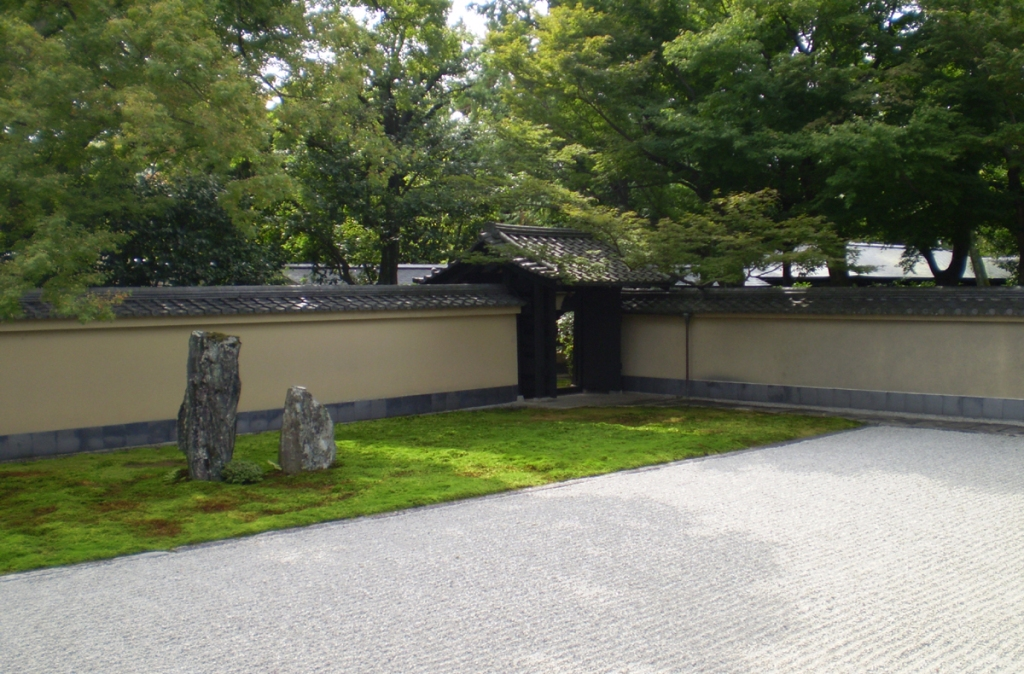 大徳寺塔頭 黄梅院の枯山水庭園です。